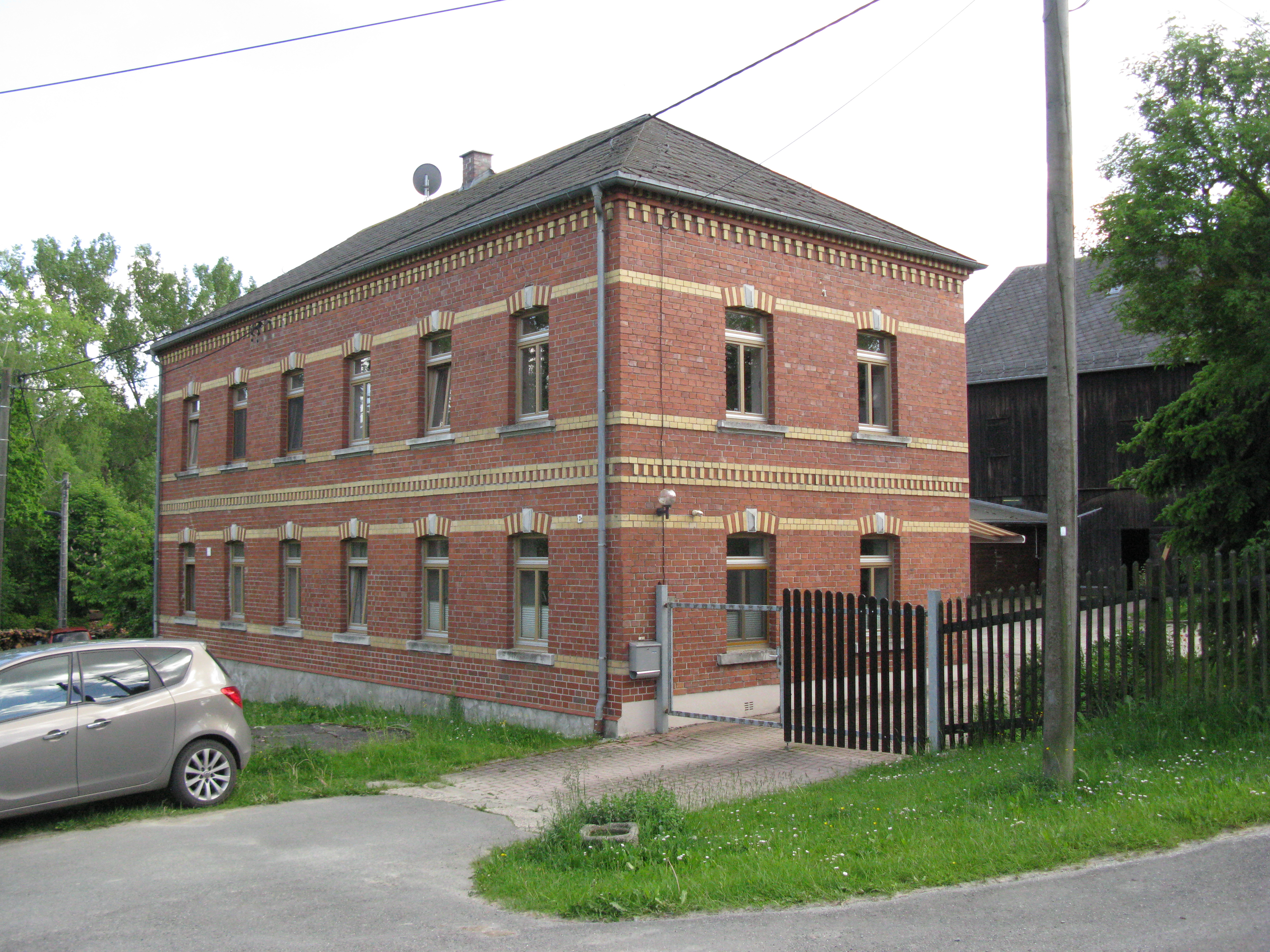 Rosenbach/Vogtl., Ortsteil Demeusel: Denkmalgeschütztes Haus am Rodauer Weg 3 (Sächsische Denkmal-ID:09231960)